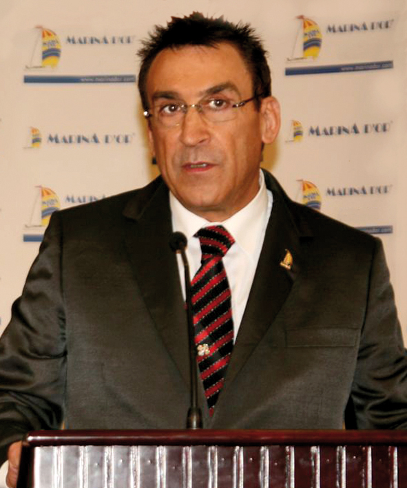 Jesús Ger García, Presidente de Marina d'Or, en Oropesa del Mar, Castellón , España